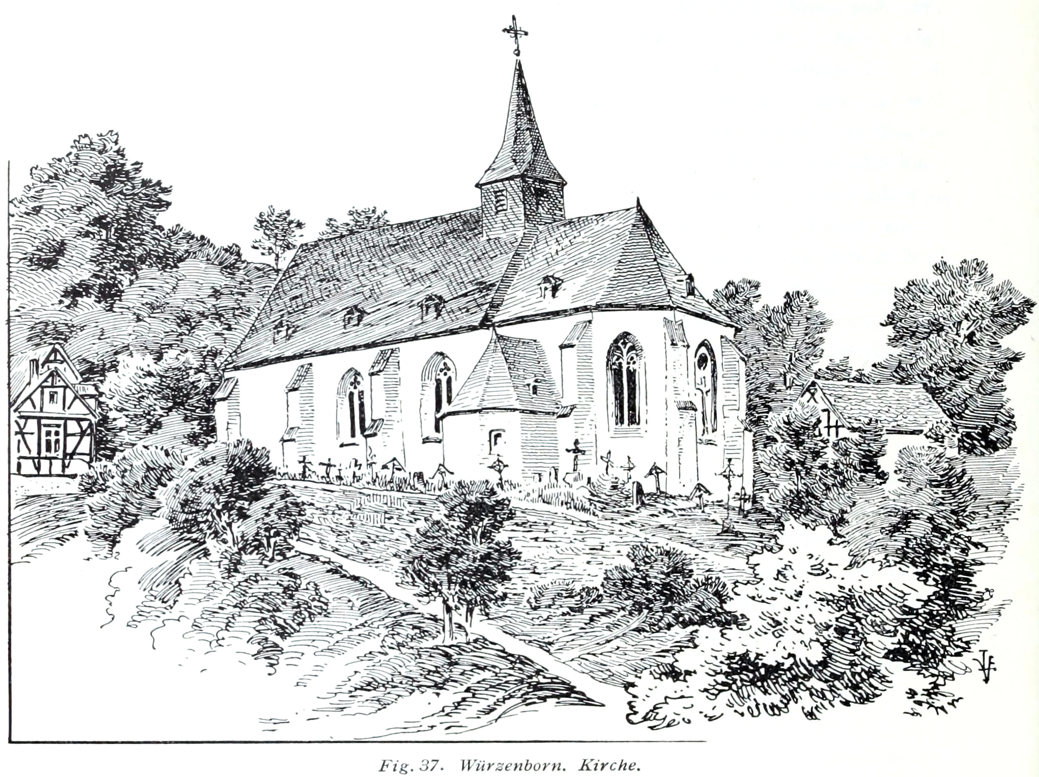 Würzenborn Kirche